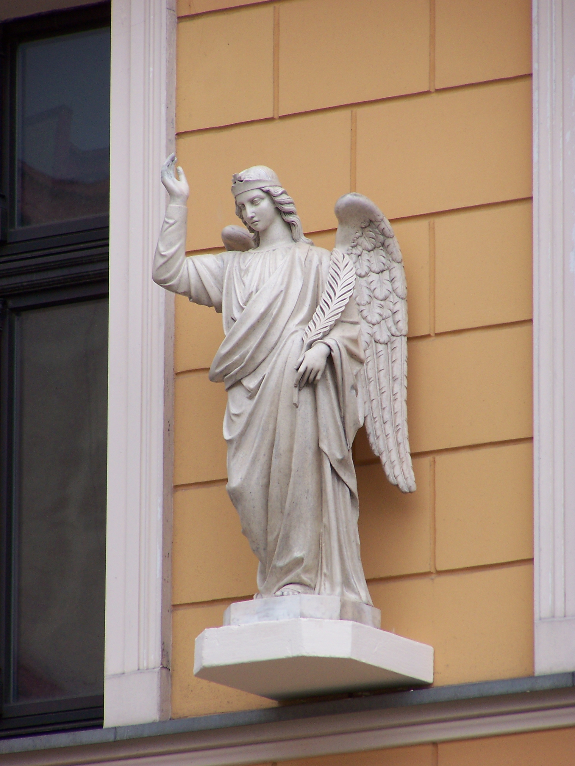 Anioł na frontonie apteki przy rynku w Tarnowskich Górach.